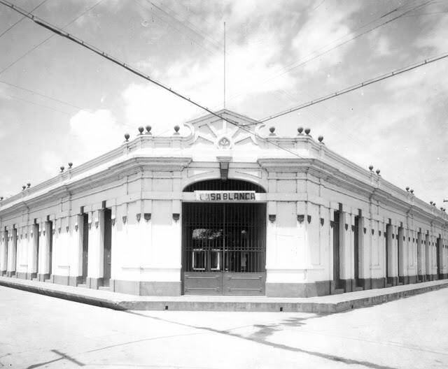 Mercado Principal de Maracay. Fotografía de Luis Felipe Toro. 1921.